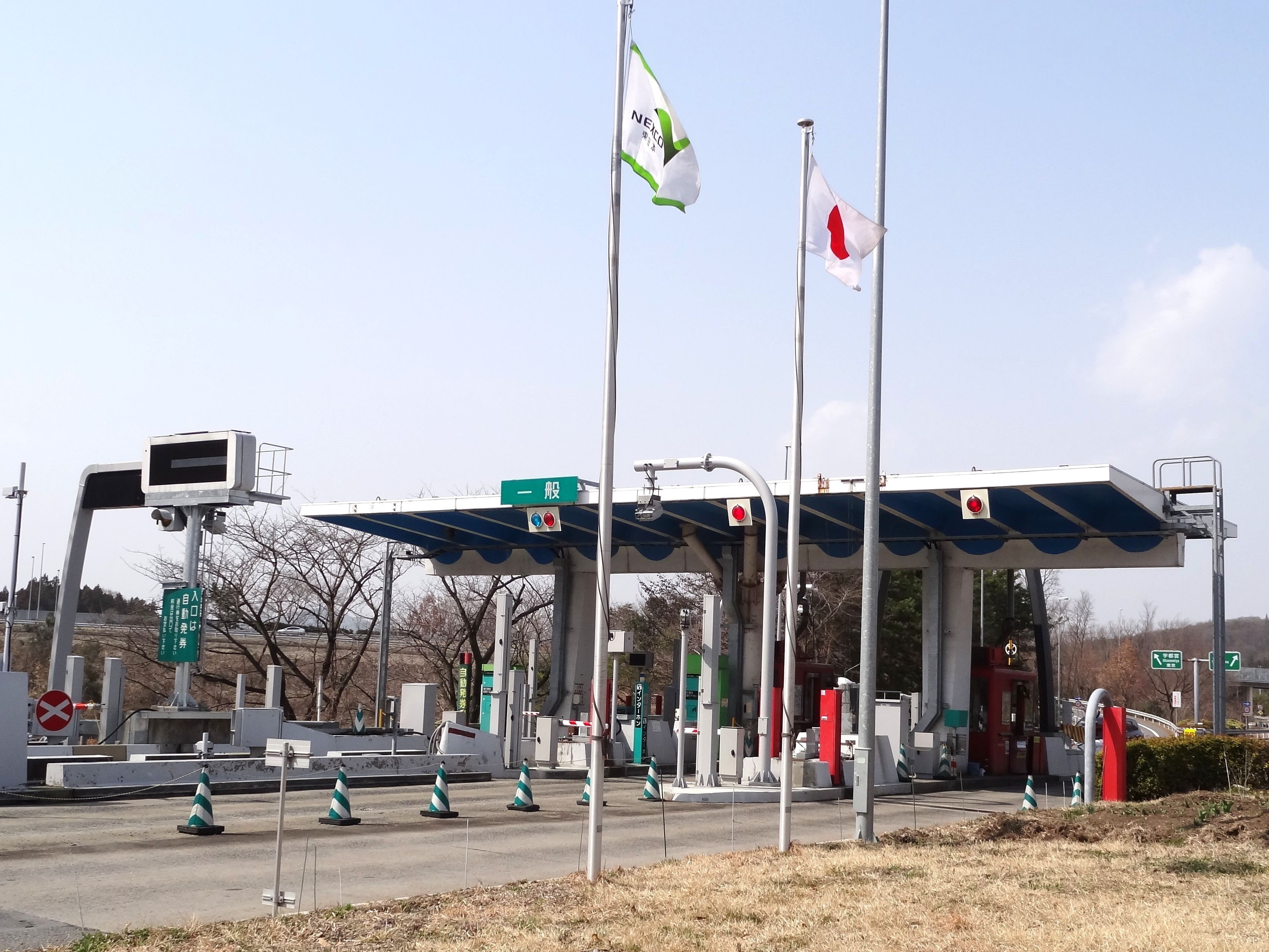 東北自動車道 矢吹IC(料金所付近)